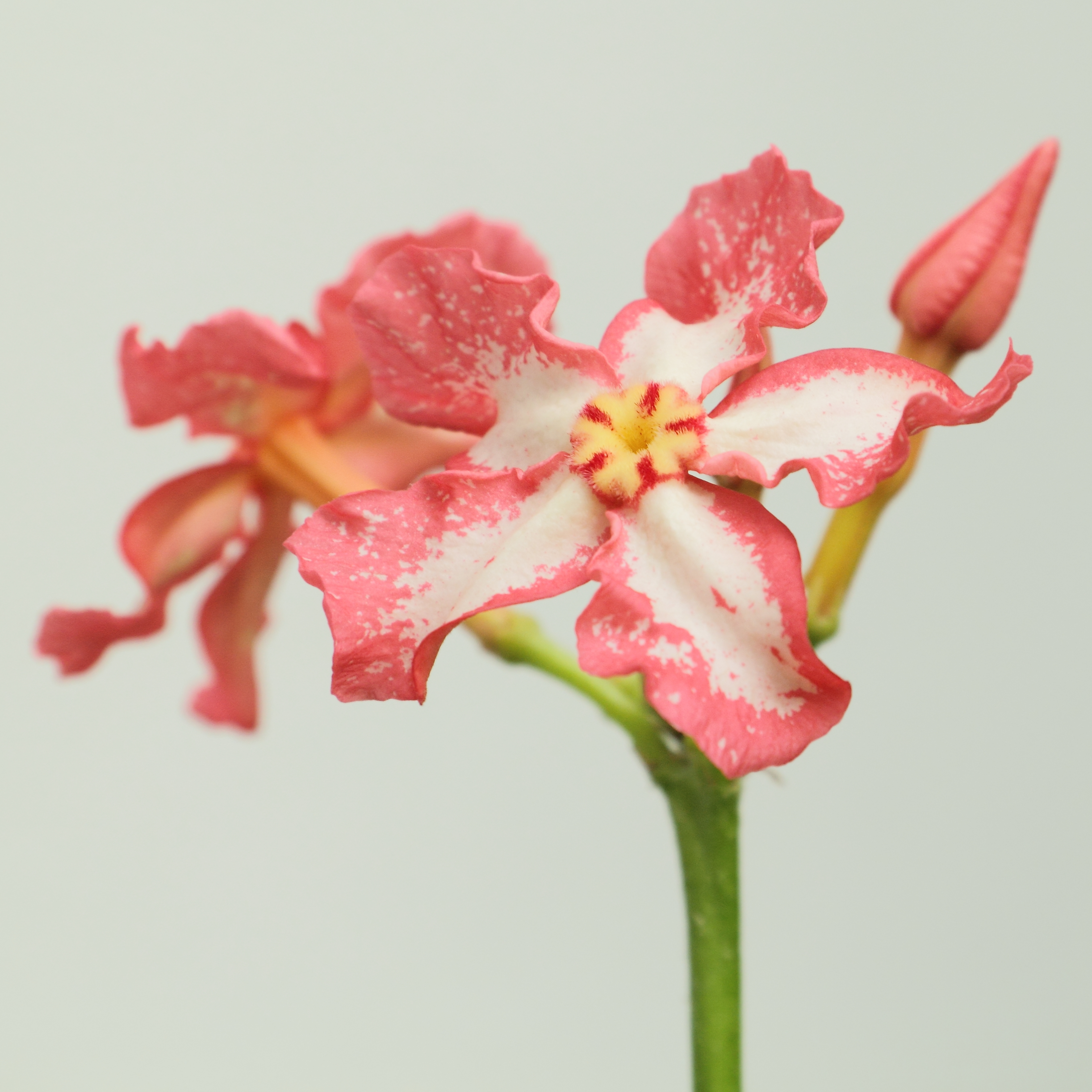 Pachypodium baronii, identifierad med hjälp av befintlig skylt vid Bergianska trädgården.